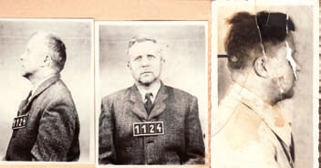 Foto von Karel Nigrín, gefertigt durch die staatliche Geheimpolizei